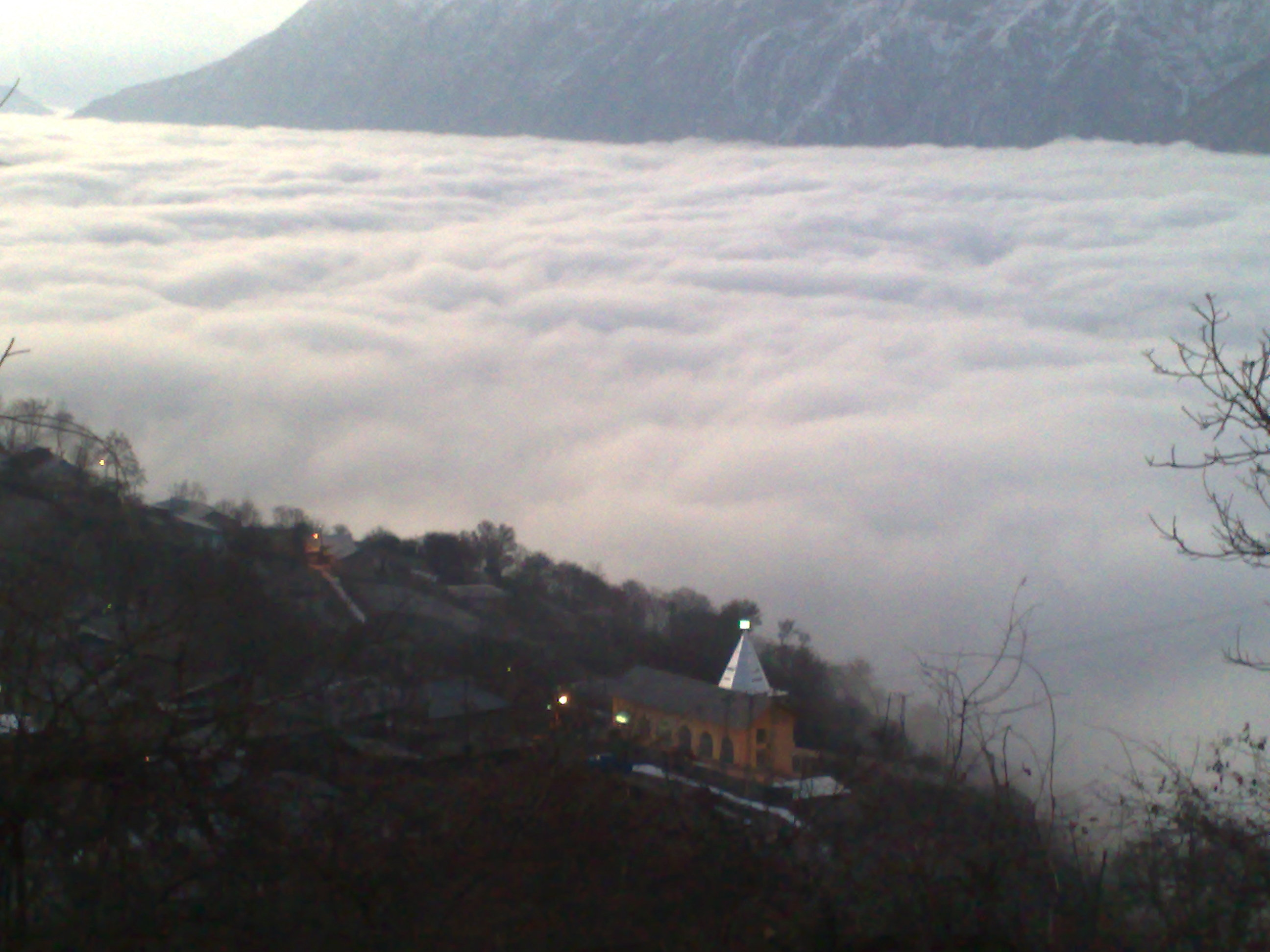 امام زاده پیربزگوار